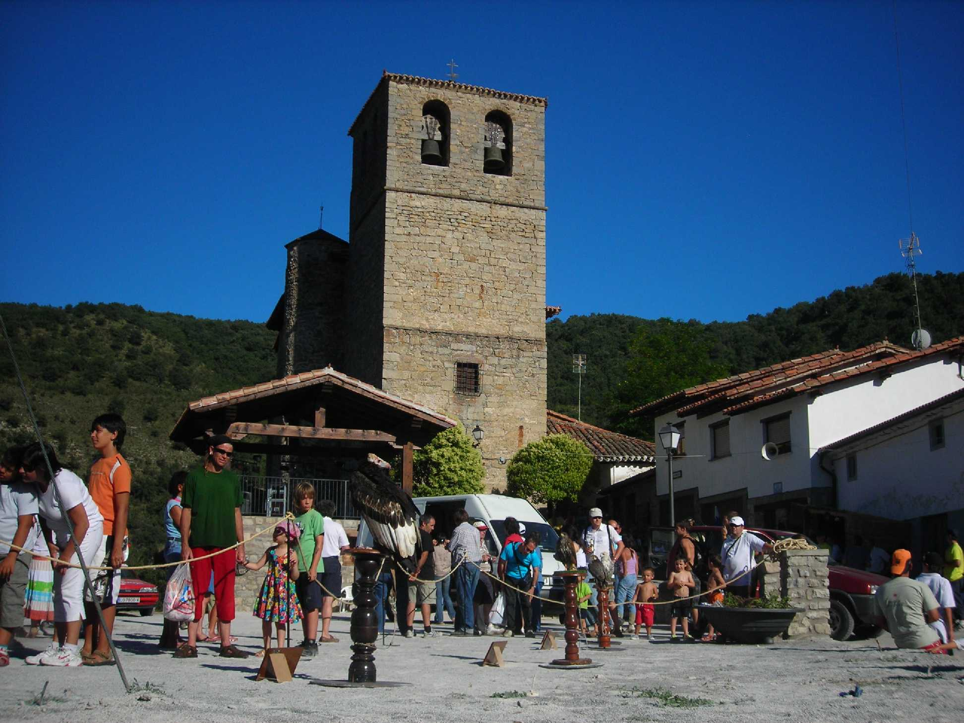 Exhibición de rapaces en la Plaza de la iglesia el Día del Camero Viejo en Terroba (La Rioja)